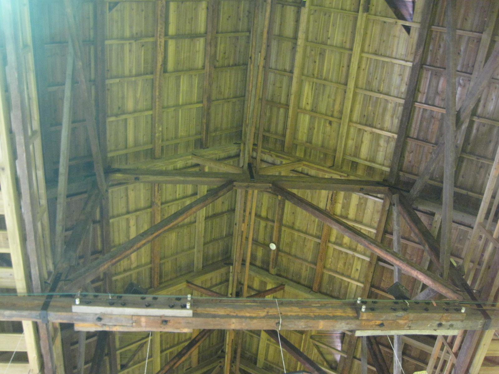 中文（台灣）: 台南公會堂後棟屋頂內部。